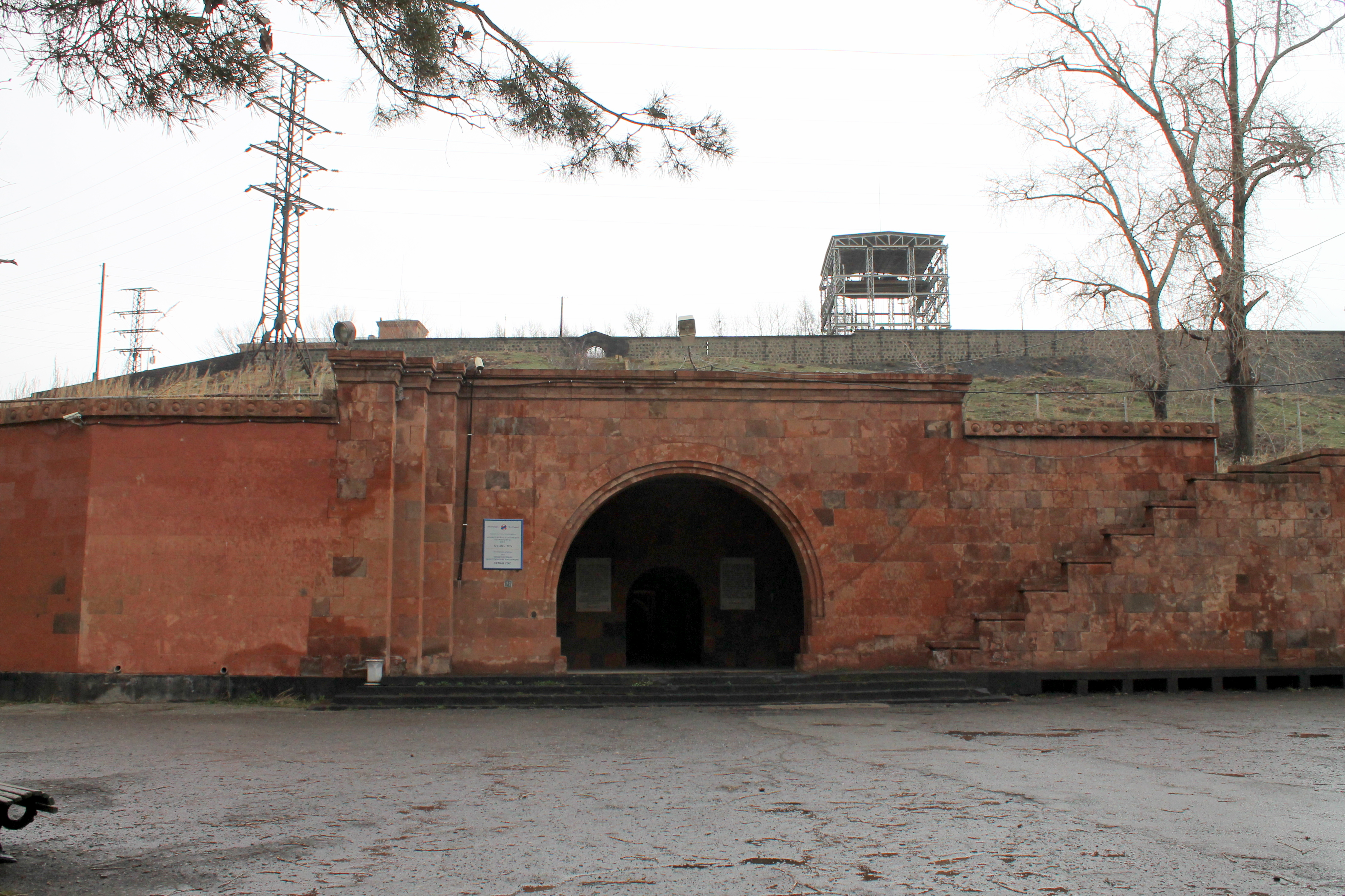 Входной портал Севанской ГЭС